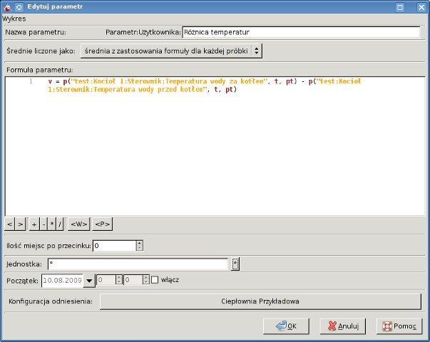 Edycji parametrów Lua w programie Draw3.